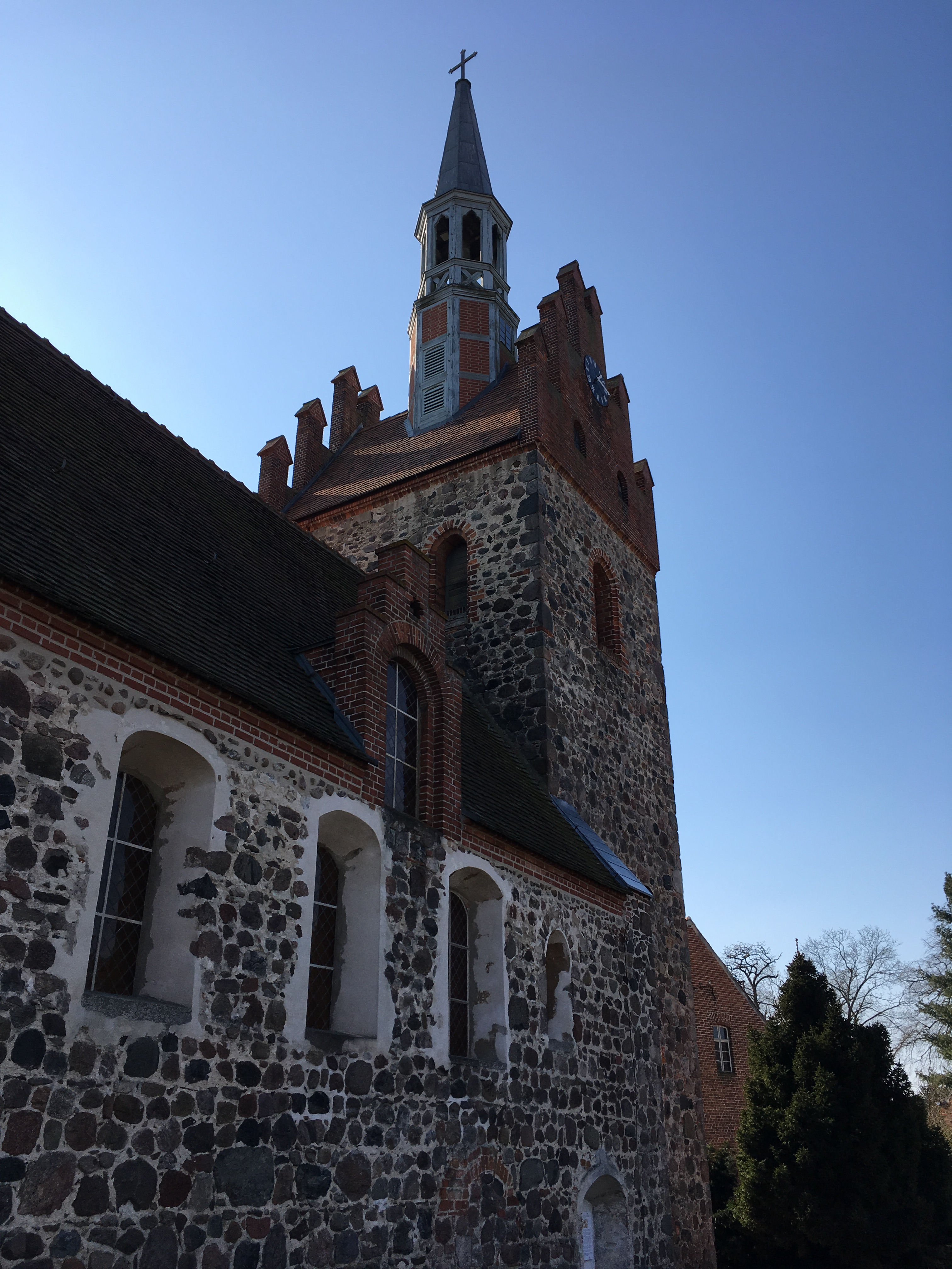 Die Dorfkirche Wittbrietzen der Stadt Beelitz im Land Brandenburg ist eine spätromanische Feldsteinkirche, die in den Jahren 1226 bis 1250 erbaut wurde.